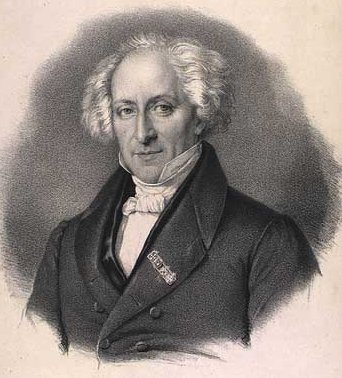 Ludvig Levin Jacobson (10.1.1783-29.8.1843) dansk læge og zoolog